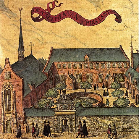 Frjentsjer, de akademy fan Fryslân